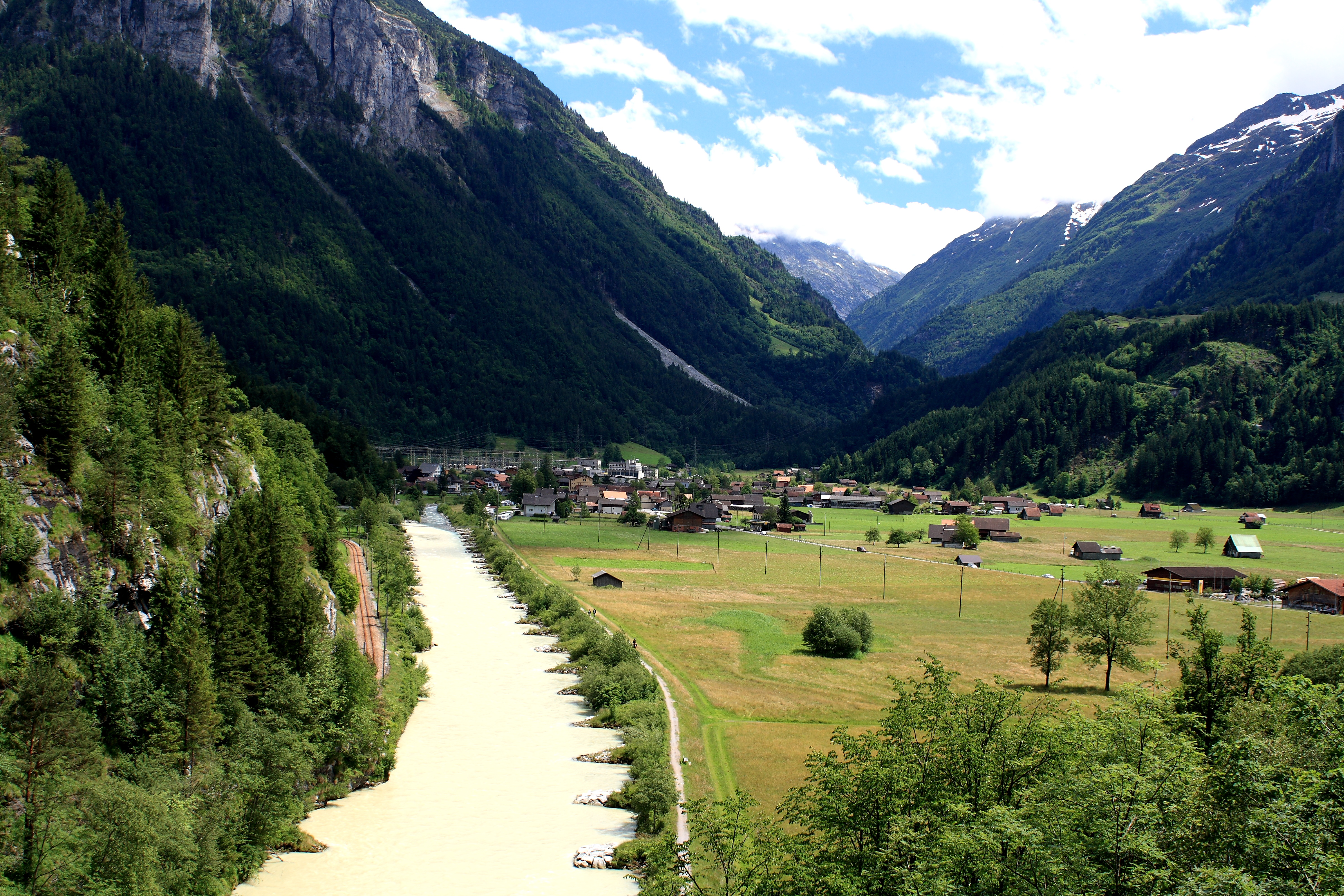 River Aar near Innertkirchen